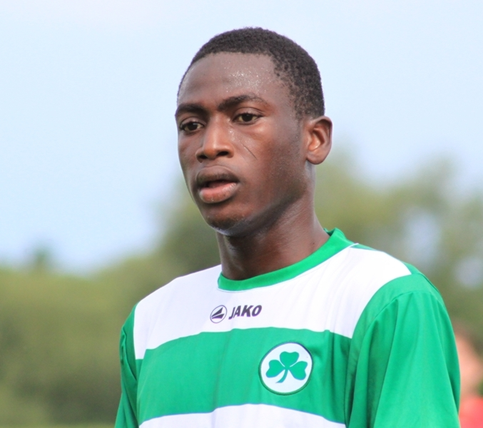 Abdul Rahman Baba